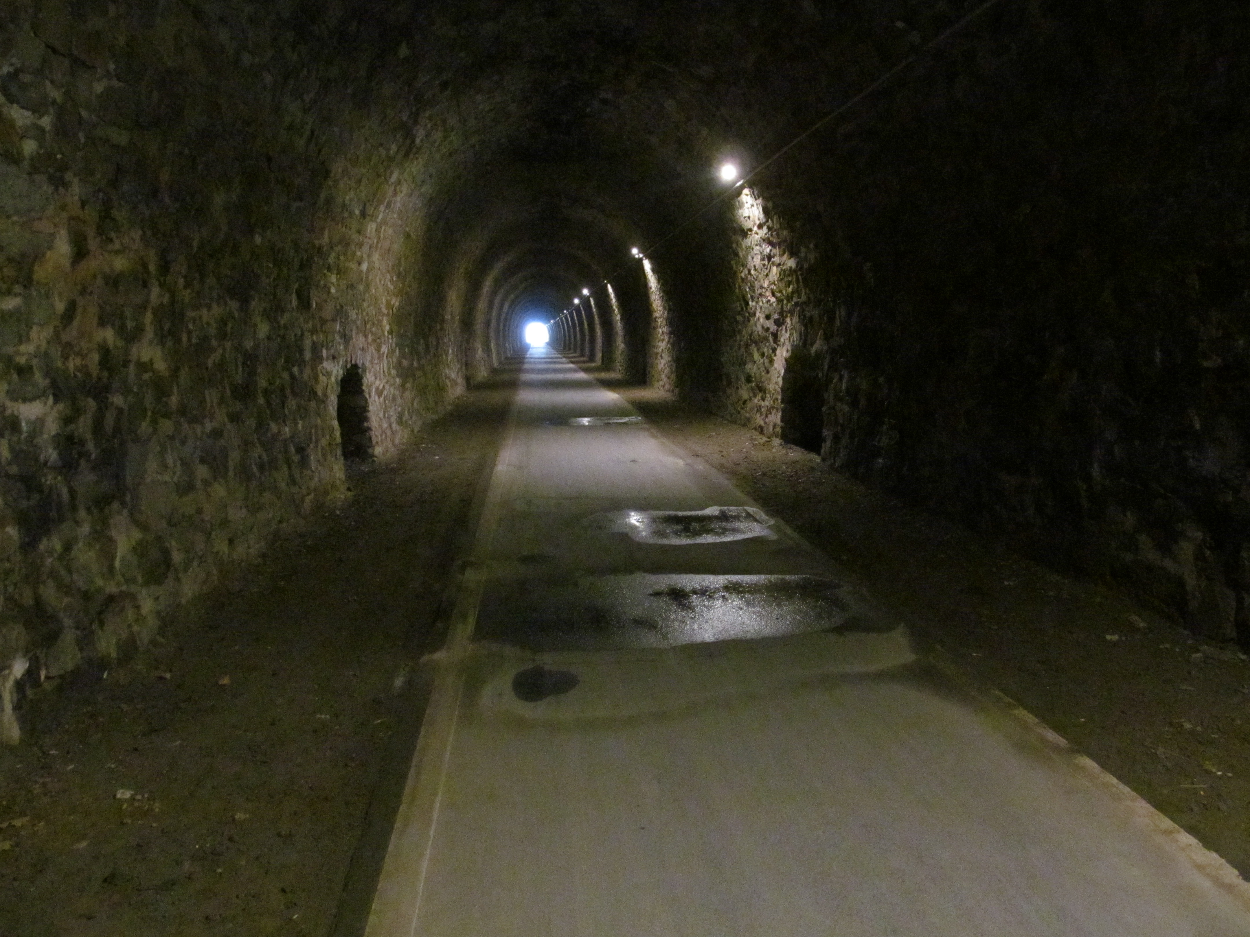 Pfützen im Bromskirchener Tunnel im Zuge des Linspherradweg, Wasser tröpfelt von der Tunneldecke